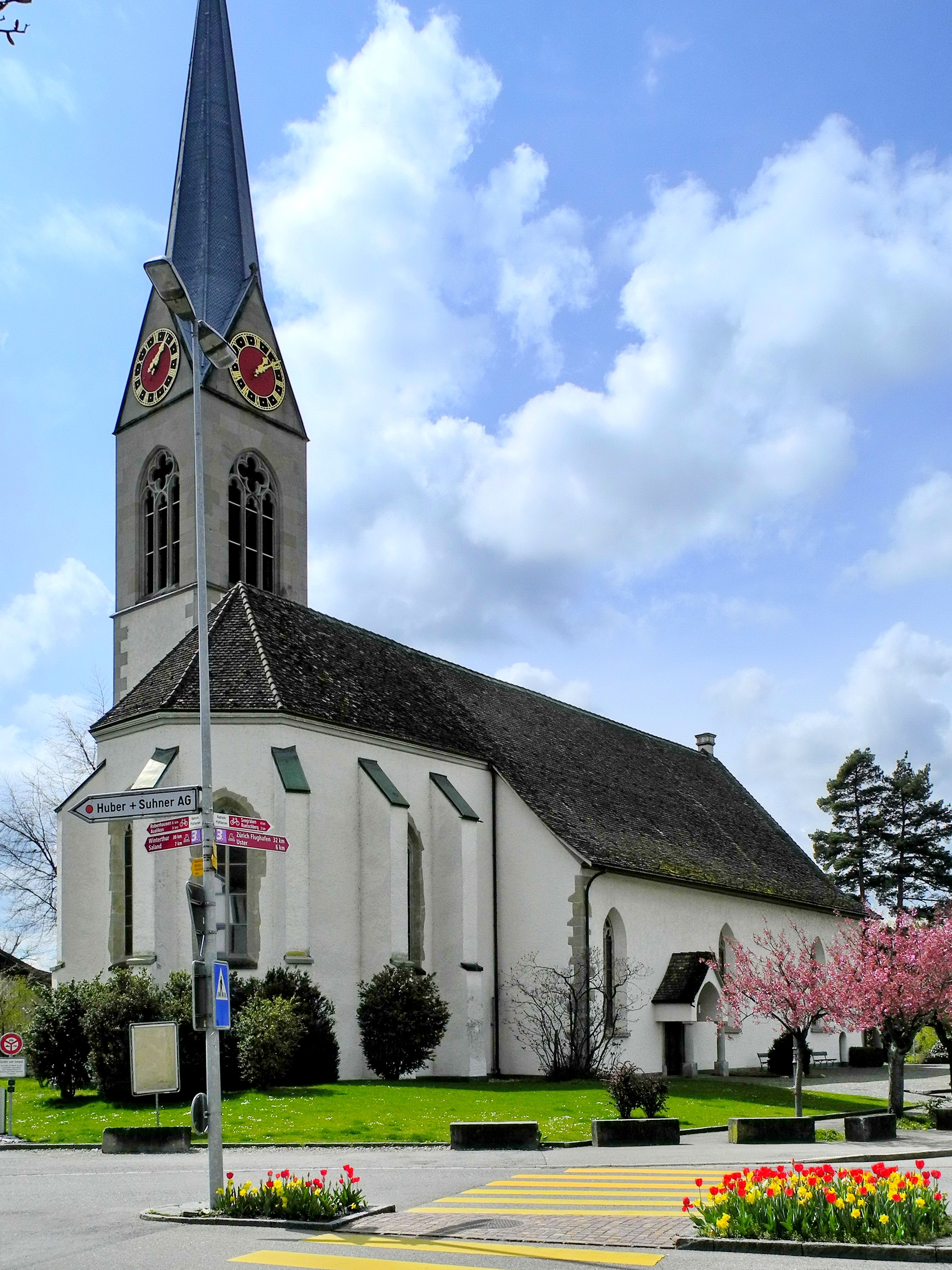 Reformierte Kirche in Pfäffikon (Switzerland)